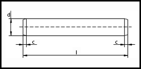 ISO 8734